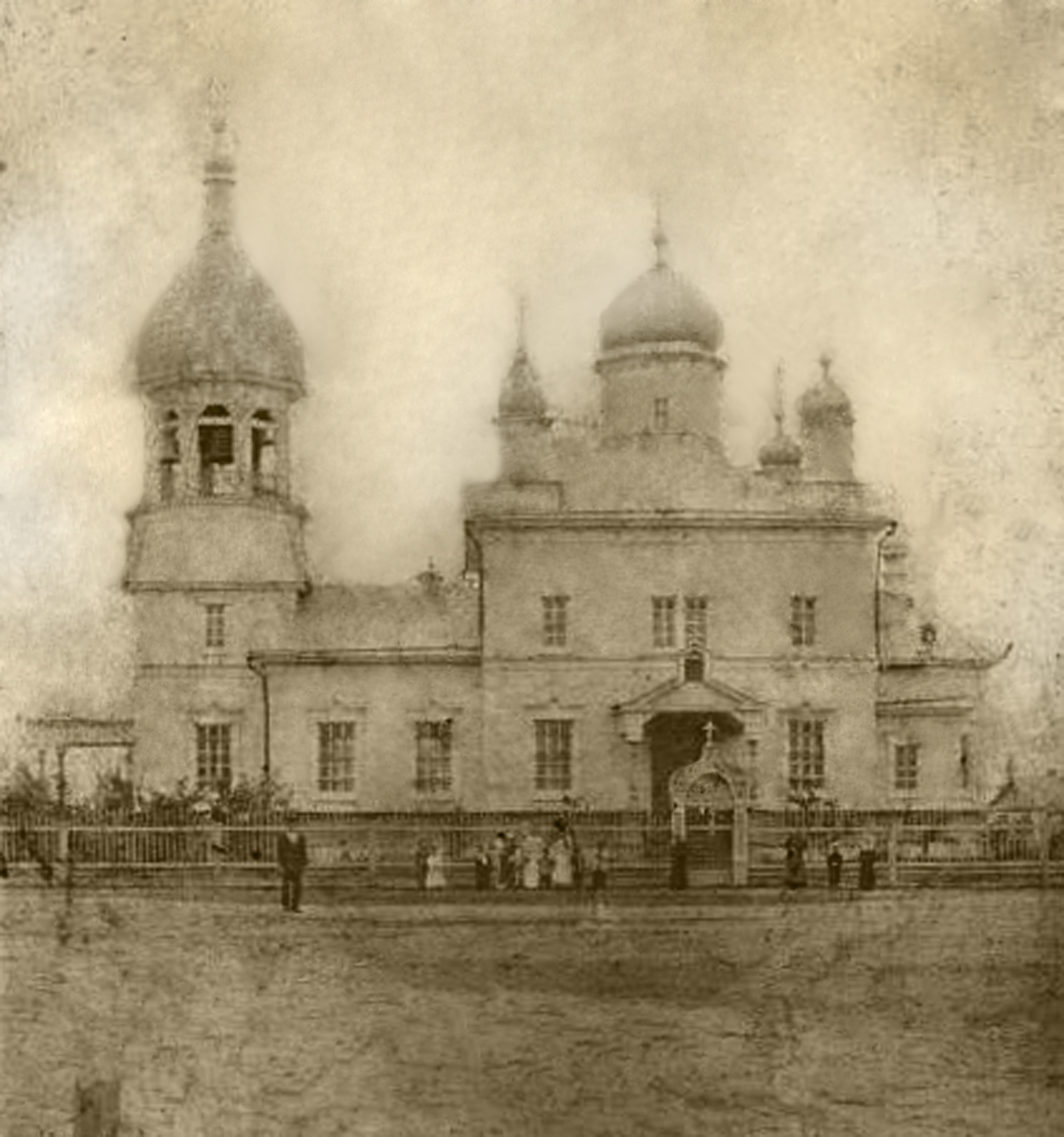 Введенская единоверческая церковь